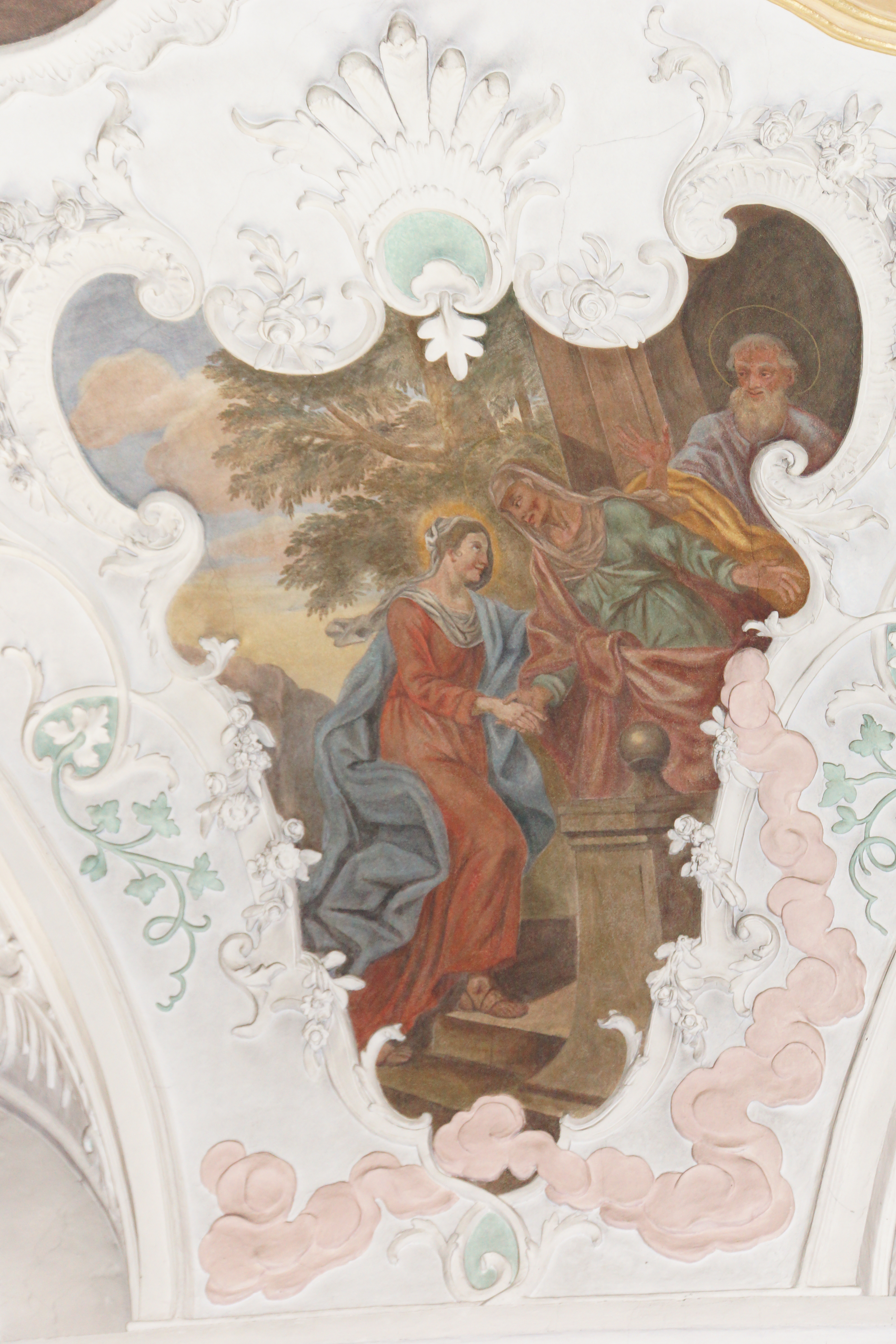 Die katholische Pfarrkirche St. Vitus in Burglengenfeld